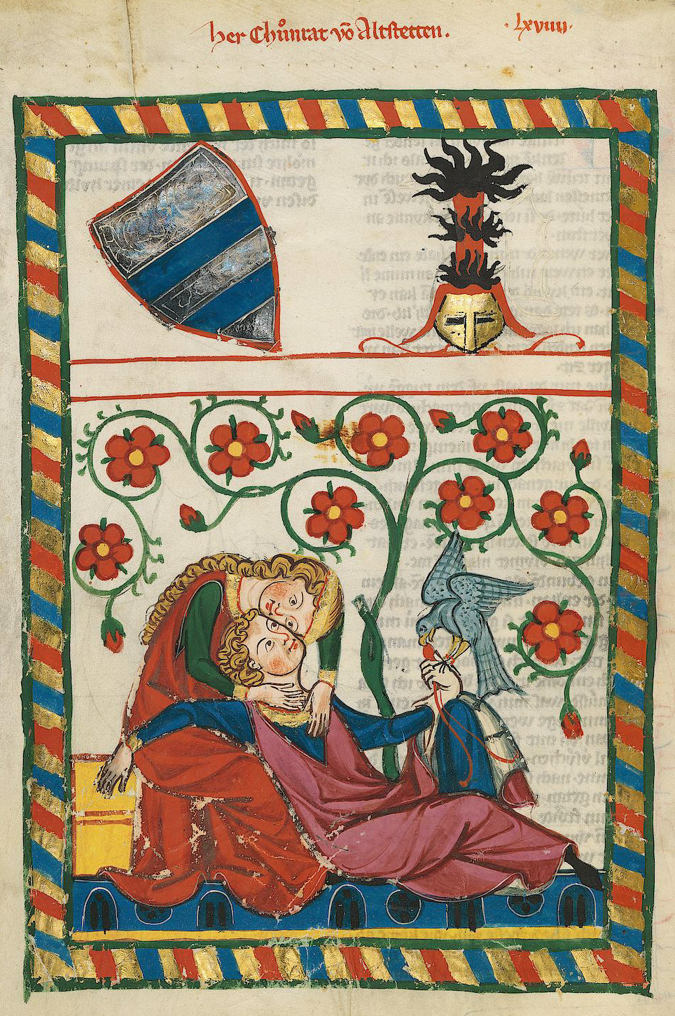 Codex Manesse, UB Heidelberg, Cod. Pal. germ. 848, fol. 249v: Herr Konrad von Altstetten. Das Geschlecht derer von Altstetten ist seit 1166 bezeugt und hatte seinen Sitz im Oberrheintal. Es stand in den Diensten des Abtes von St. Gallen. Vermutlich handelt es sich bei dem Minnesänger um den 1320 bis 1327 urkundenden Konrad von Altstetten, der das Meieramt innehatte.